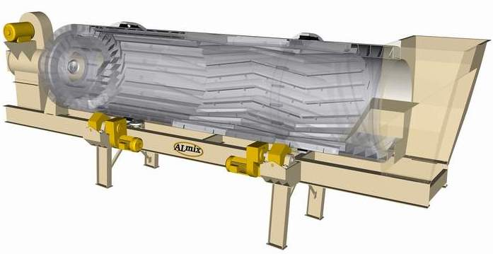 Secador_rotativo